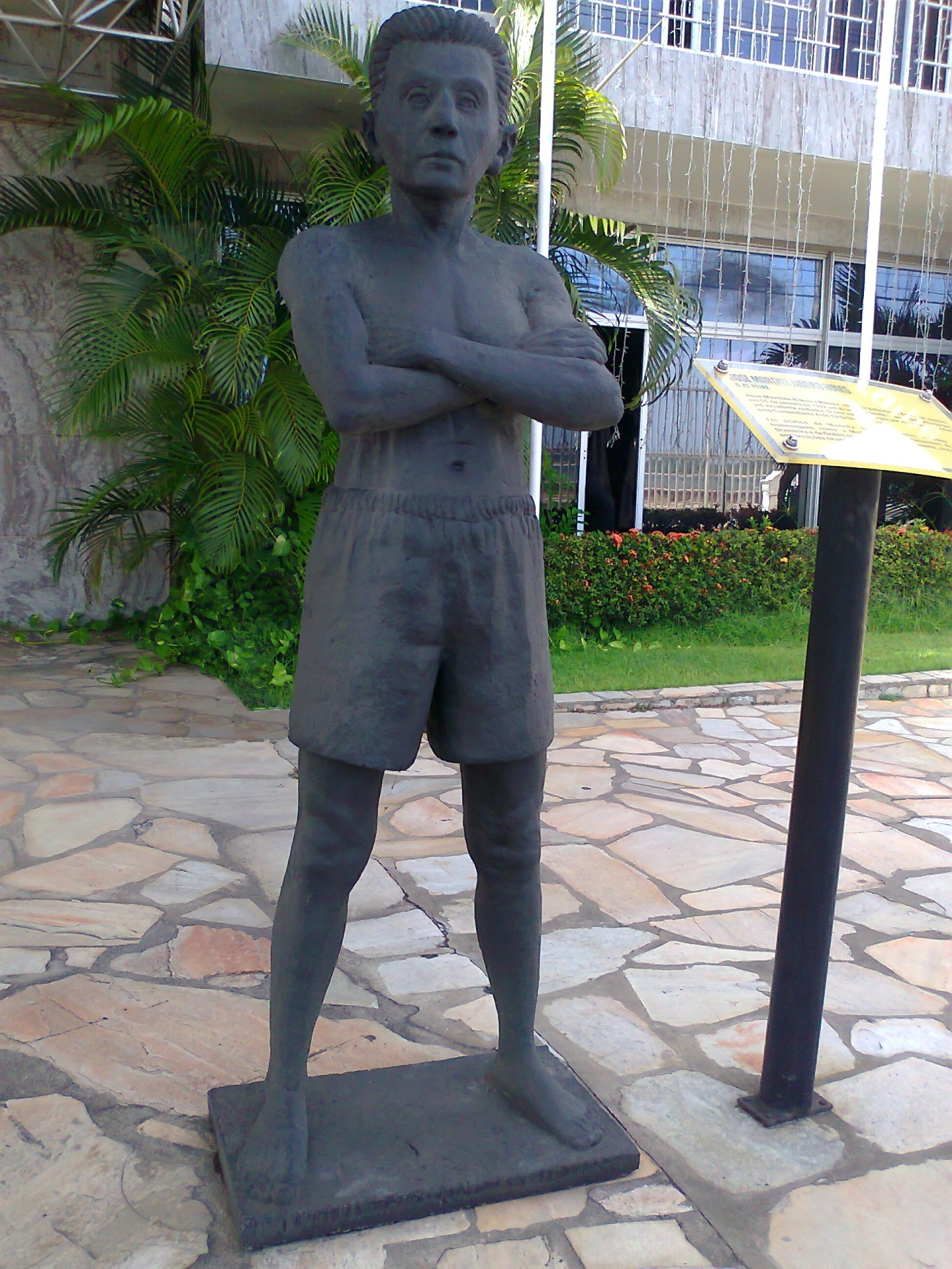 Estátua de José Martins Ribeiro Nunes, o Zé Peixe, obra do artista Deolando Vieira da Silva, exposta no Memorial de Sergipe.